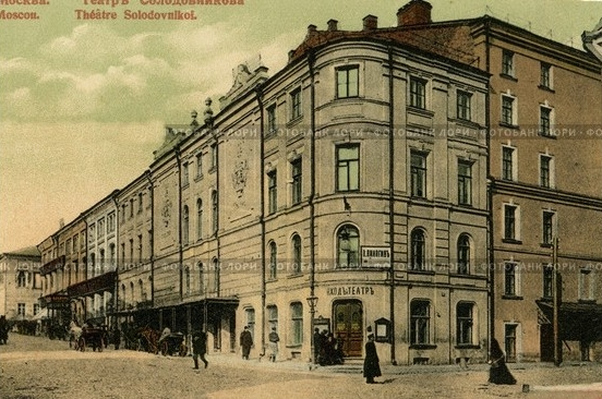 Театр Солодовникова на Большой Дмитровке